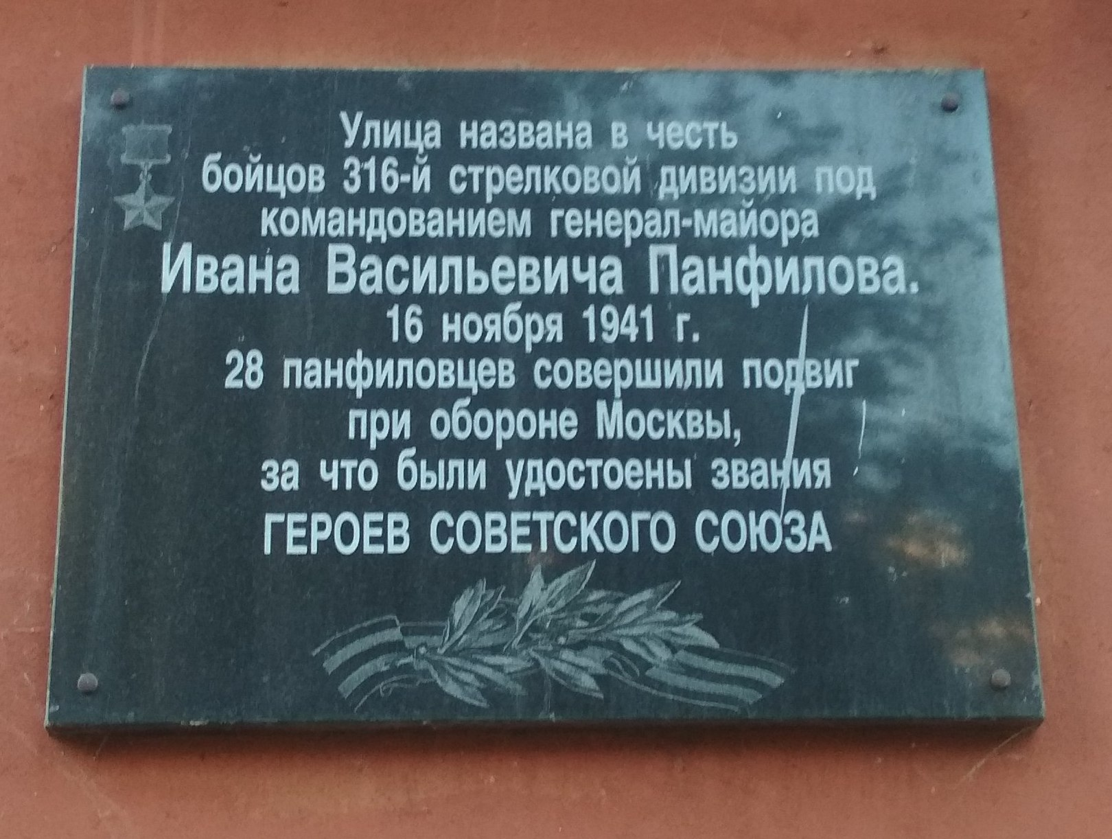 Памятная доска на здании по улице Панфиловцев в Нижнем Новгороде